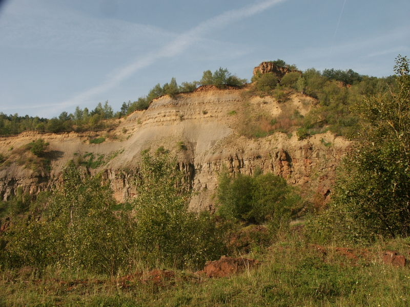 Sujet: D'Natur hëllt sëch alles erëm. Hei wuar fréier "Tagebau". Source: Fotograf: SITCK Lizenz